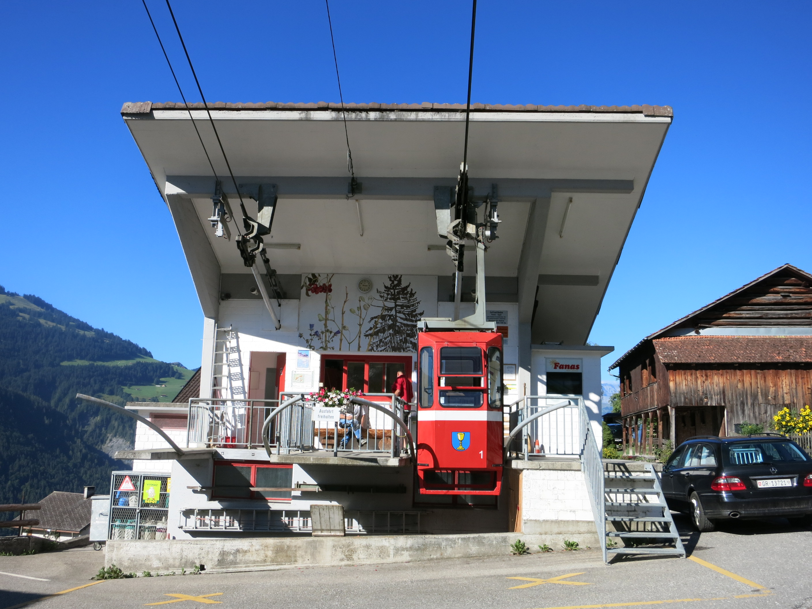 Luftseilbahn Fanas–Eggli, Fanas GR, Schweiz: Talstation